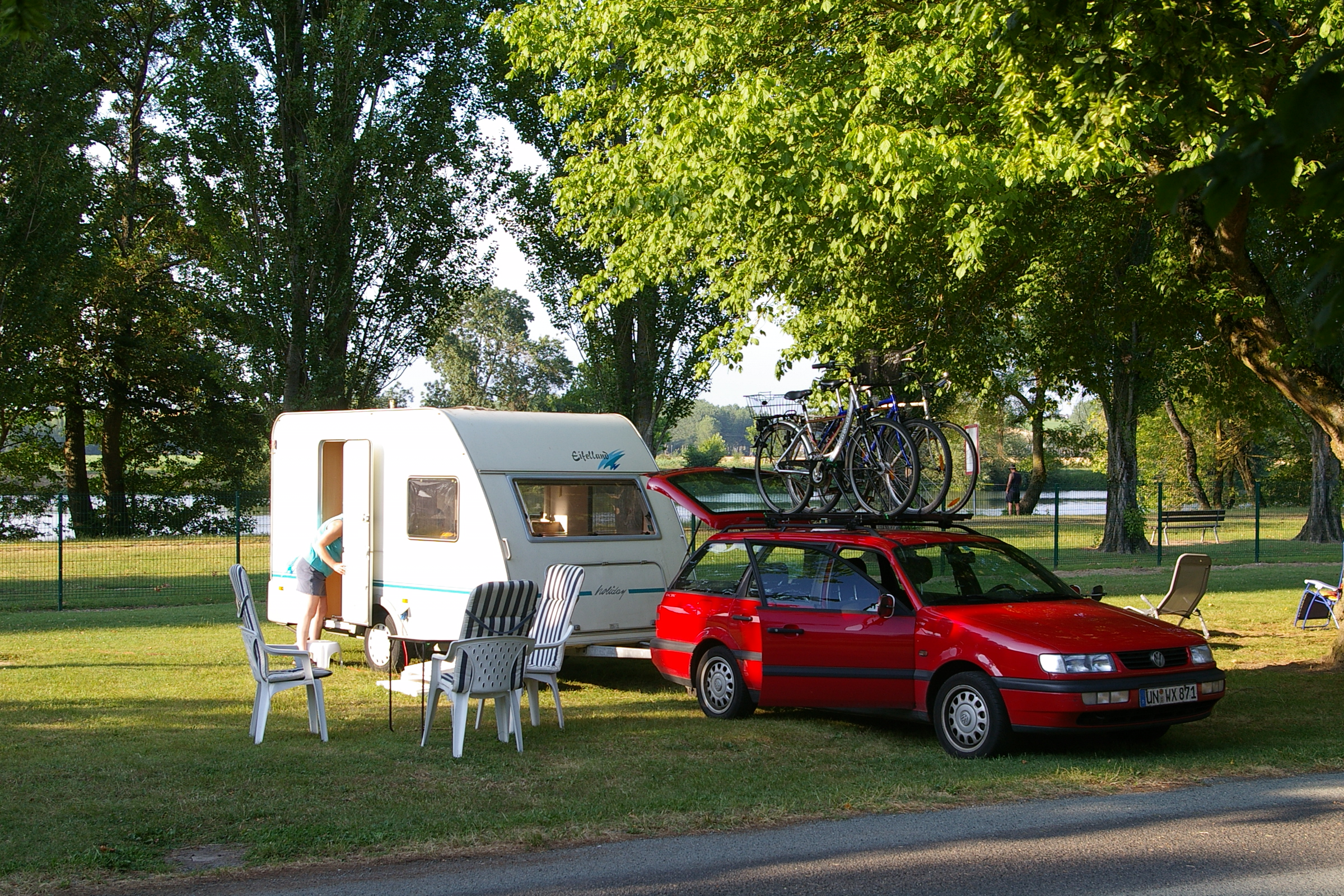 Caravan-Gespann im Tal des Cher, Camping Municipal von Bléré.